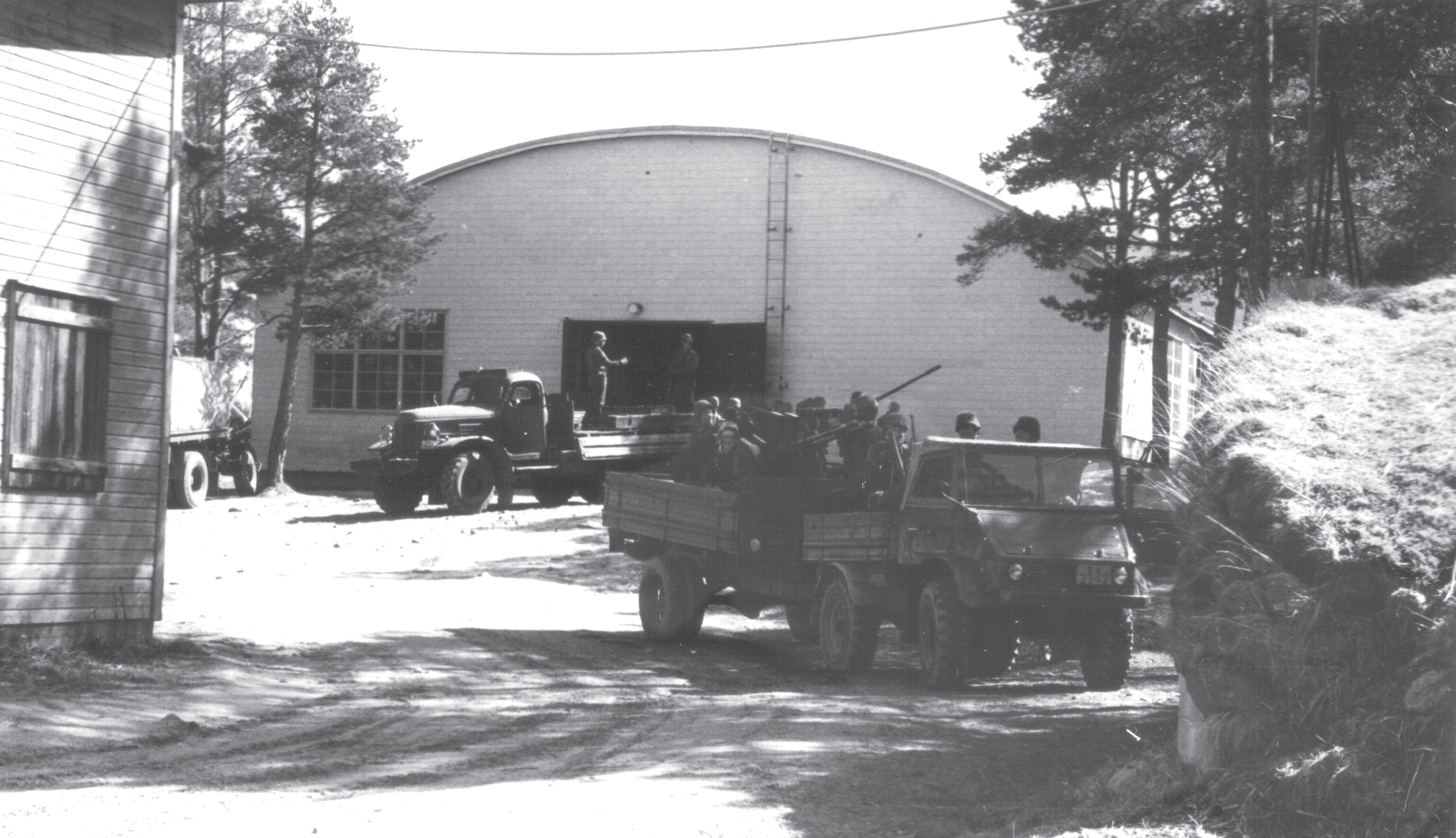 Tykkihallin piha Pikiruukissa.